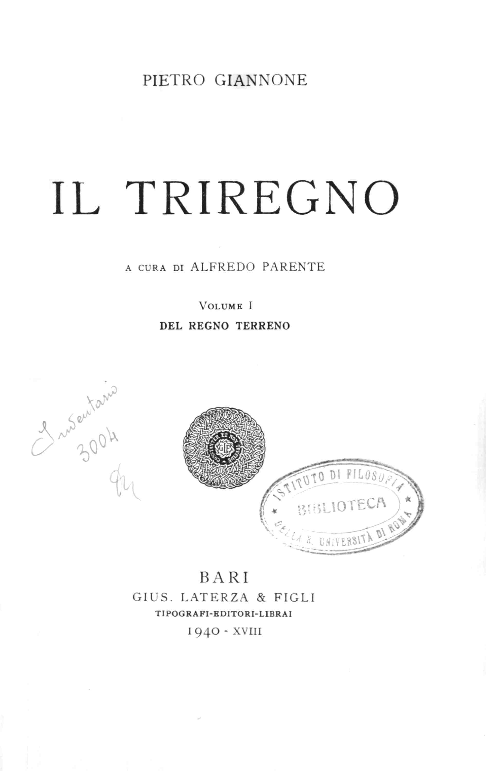 1: Del regno terreno / Pietro Giannone ; a cura di Alfredo Parente. - Bari : Laterza, 1940. - 395 p. ; 22 cm. - (Scrittori d'Italia ; 176) .